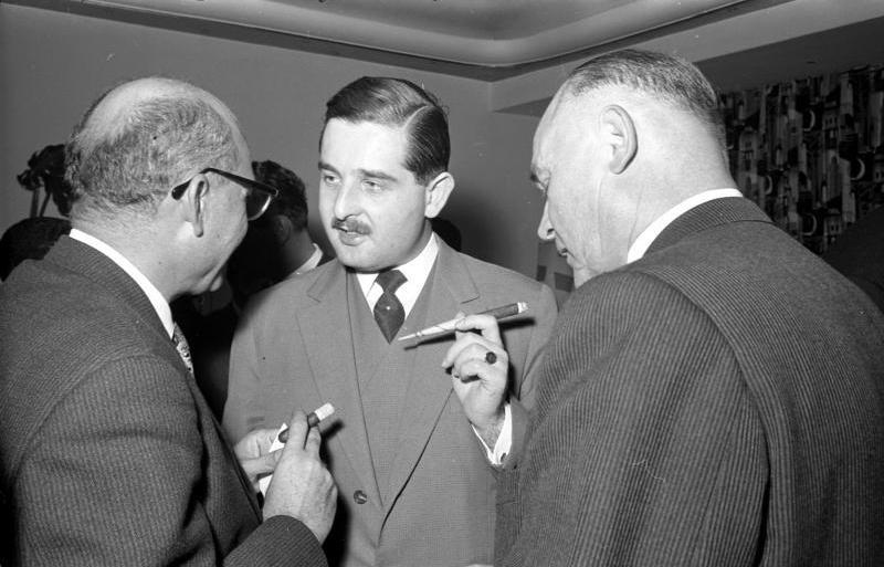 Deutscher Industrie- und Handelstag Empfang im Presseclub für Munir Baaba, General Direktor im libyschen Wirtschafts-Ministerium